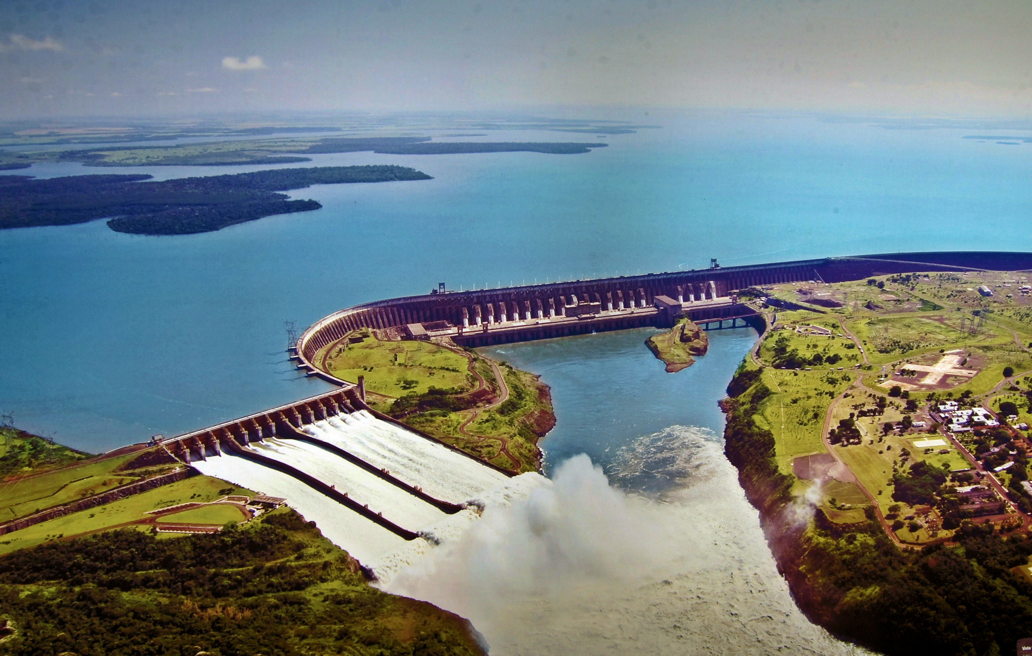 Itaipu